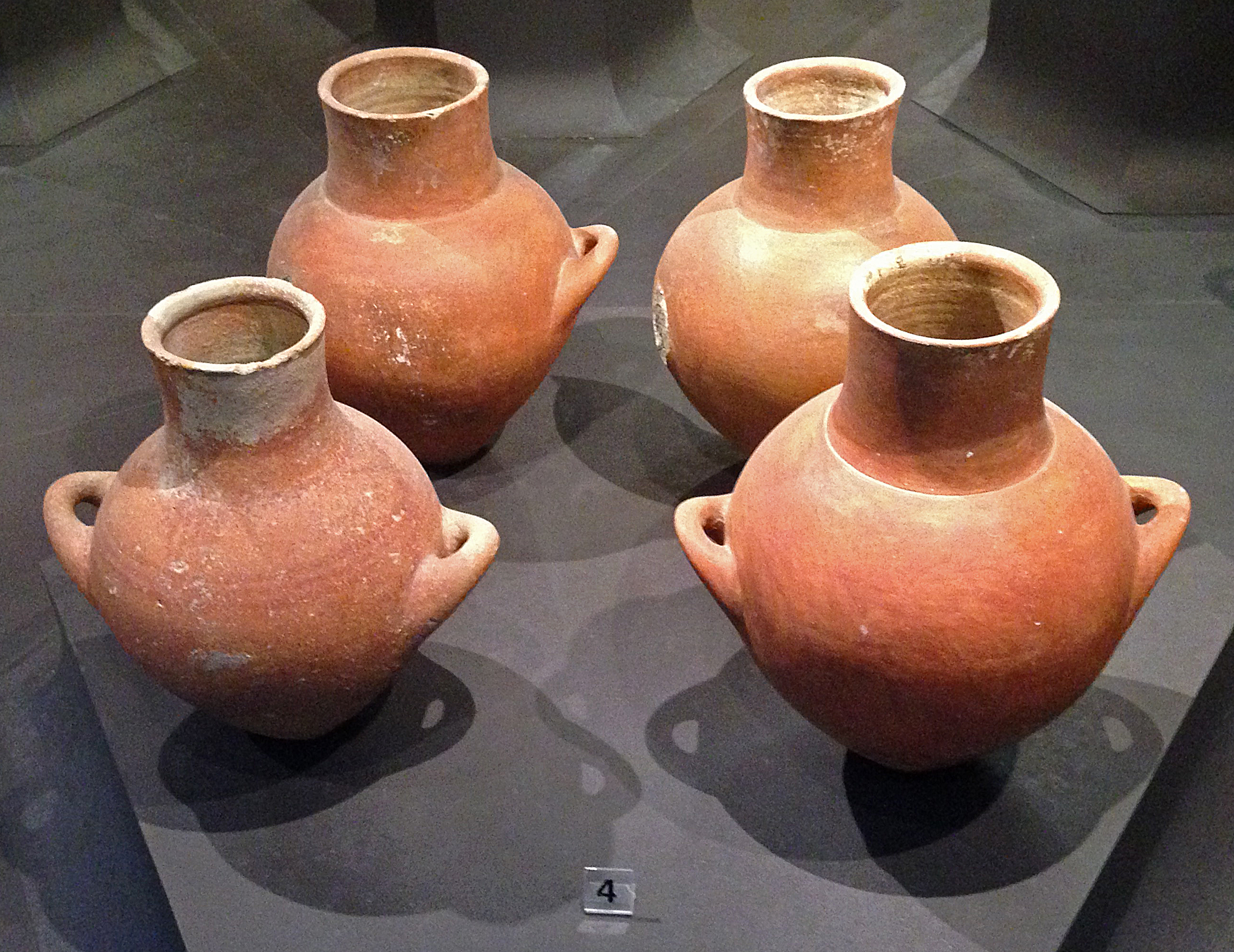 Anfore di Pantalica con decorazione in rosso a motivi geometrici. Fase di Pantalica I 1250-1050 a.C.